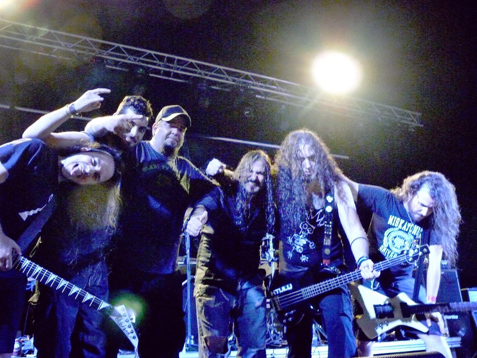 Imagen del grupo ktulu en directo